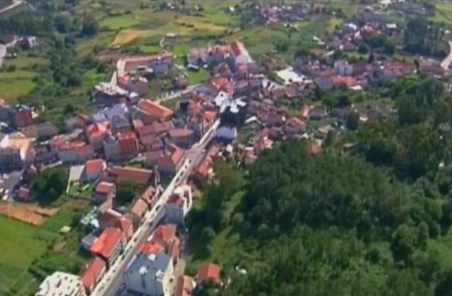 Vista aérea da Cañiza